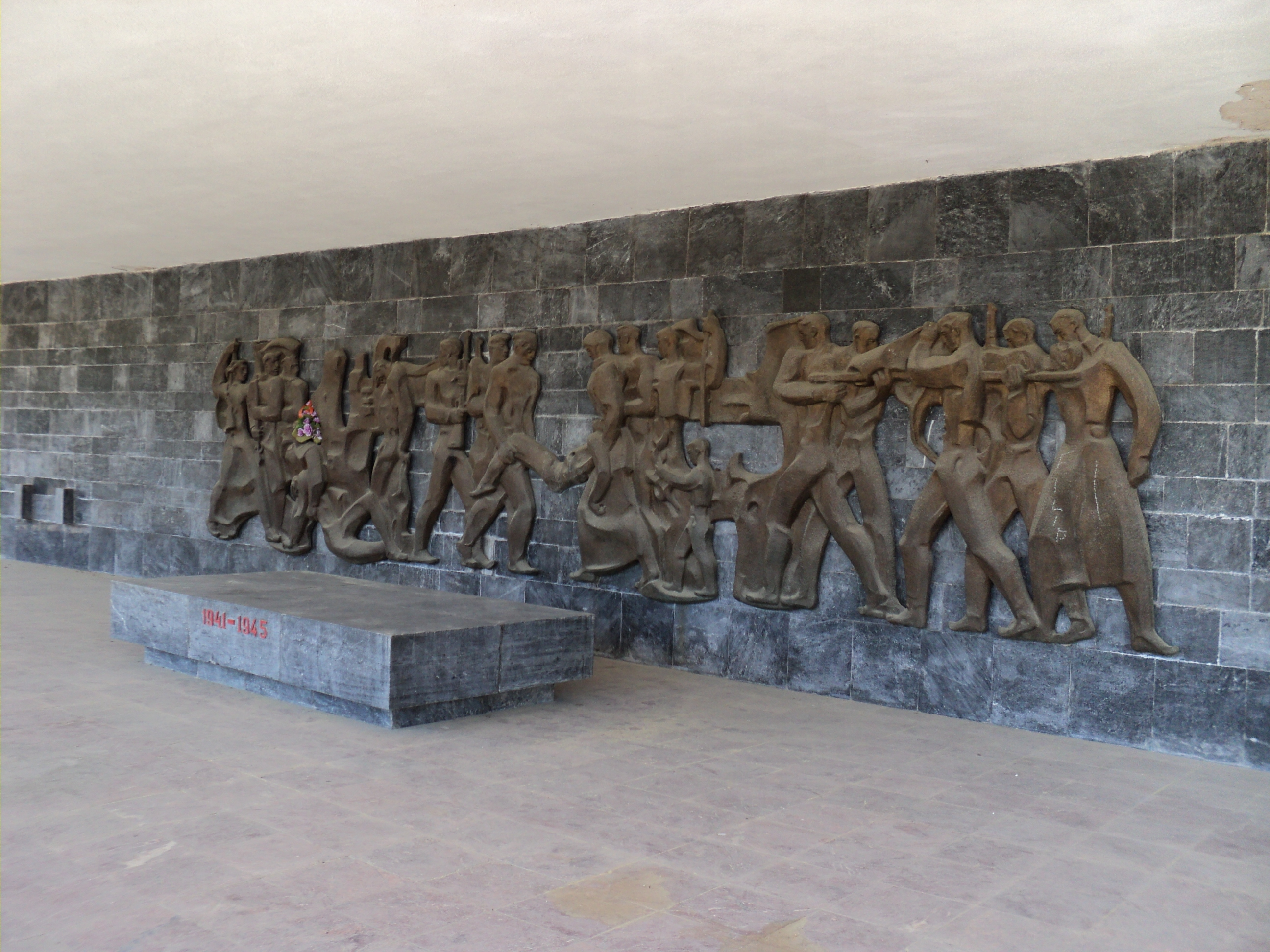 Reljef na spomen-kosturnici palih boraca i žrtava fašizma, Kitino kale u Kičevu. Self-made. Jul 2011.